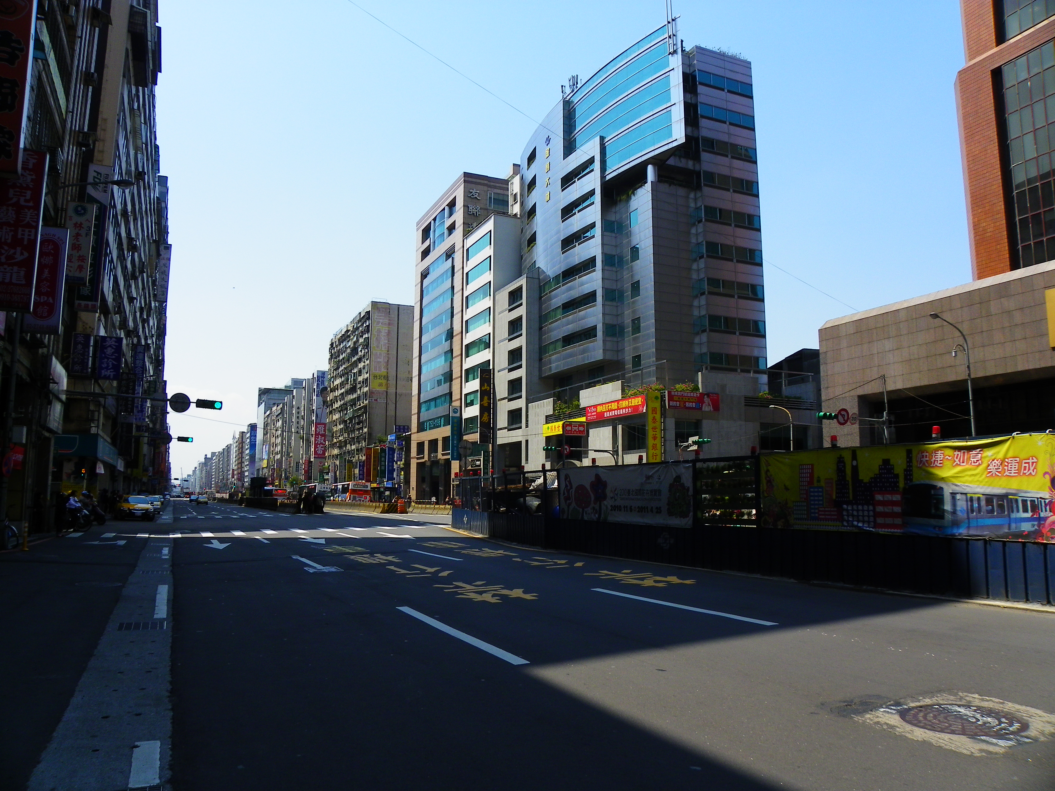 從臺北市松山區中華開發大樓前西望南京東路五段與施工中的捷運松山線。